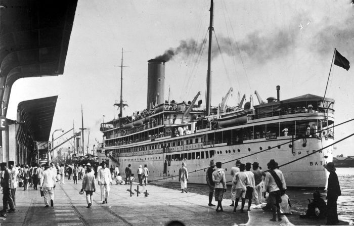 Repronegatief. Aankomst van het mailstoomschip Op ten Noord in Tandjoengpriok, de haven van Batavia, Java